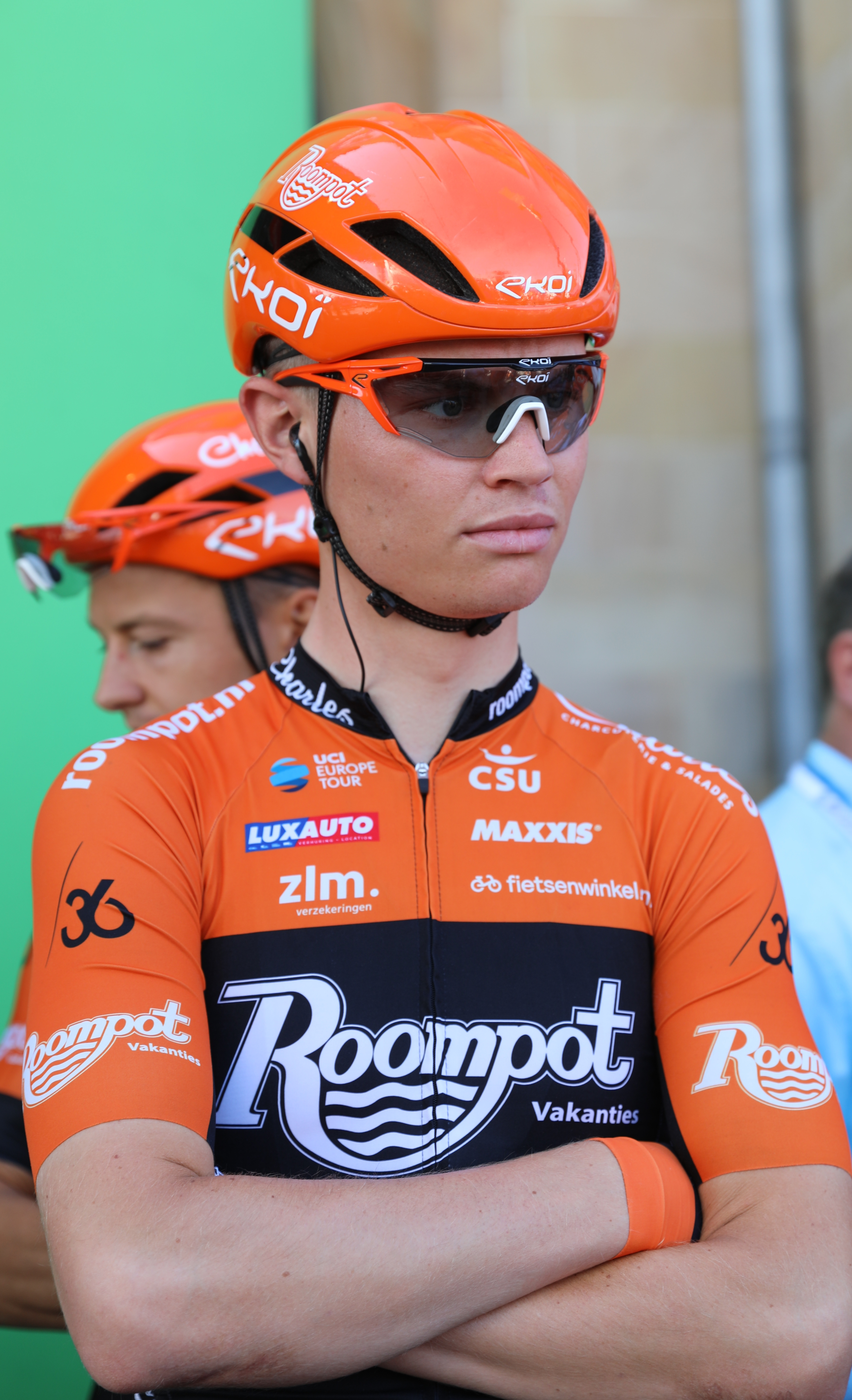 Senne Leysen, belgischer Radrennfahrer